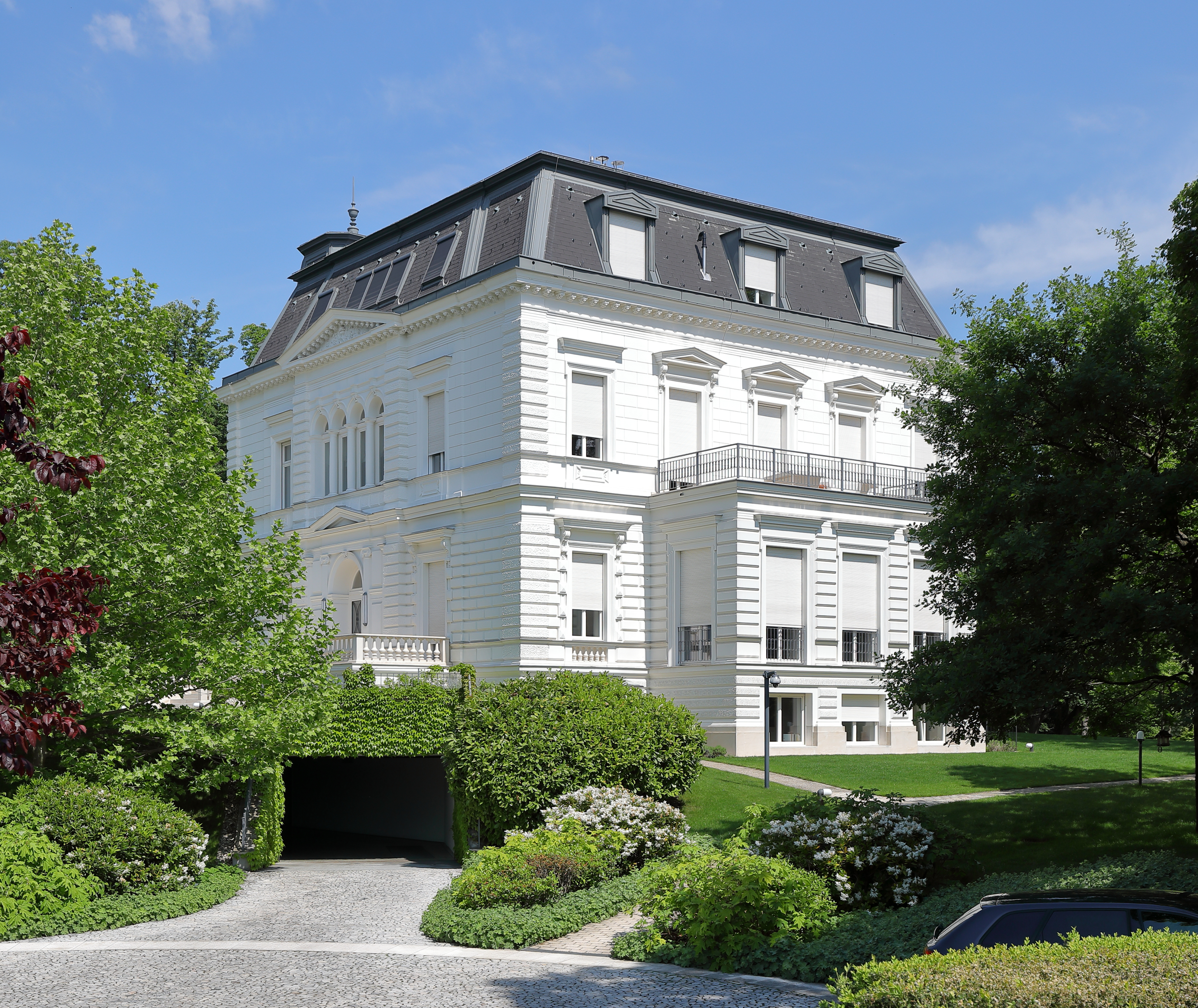 Die Villa an der Adresse Salmannsdorfer Höhe 10 im 19. Wiener Gemeindebezirk Döbling. Ab 2007 baute Martin Schlaff das Areal zu einem Herrschaftssitz um. Unter anderem errichtete er dabei eine Tiefgarage für etwa 14 Autos und ein Nebengebäude auf einer Fläche von 711 Quadratmetern als Gartenvilla“. Bei der "teuersten" Scheidung der Welt ging 2008 die Hauptvilla in das Eigentum seiner Exfrau Andrea über.